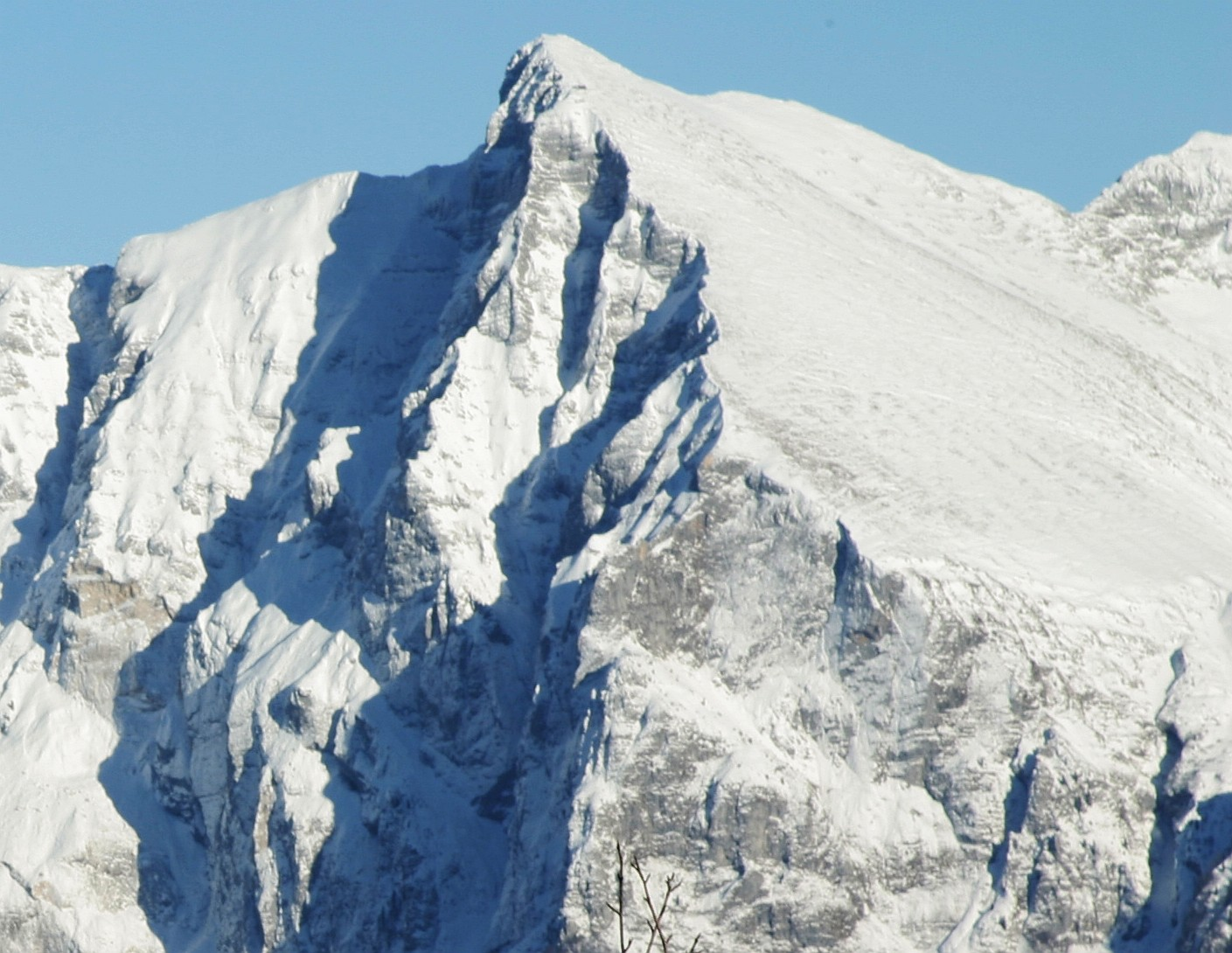 Monte Nero - Il versante Ovest ed il Lavadôr (lavatoio) innevato